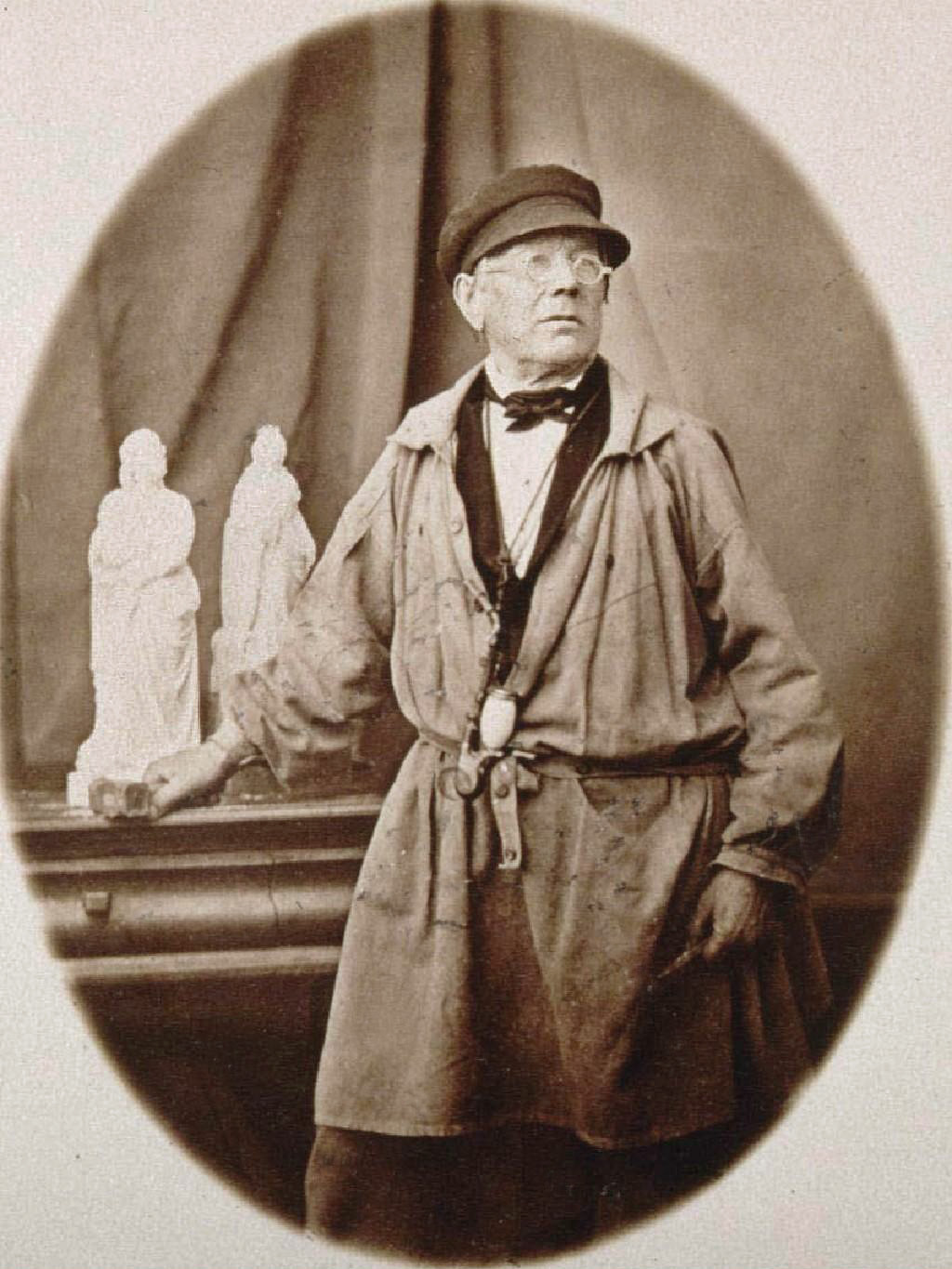 André Friedrich, sculpteur, Mi-corps, profil 3/4 à dr., en méd. ov. Bibliothèque nationale et universitaire de Strasbourg